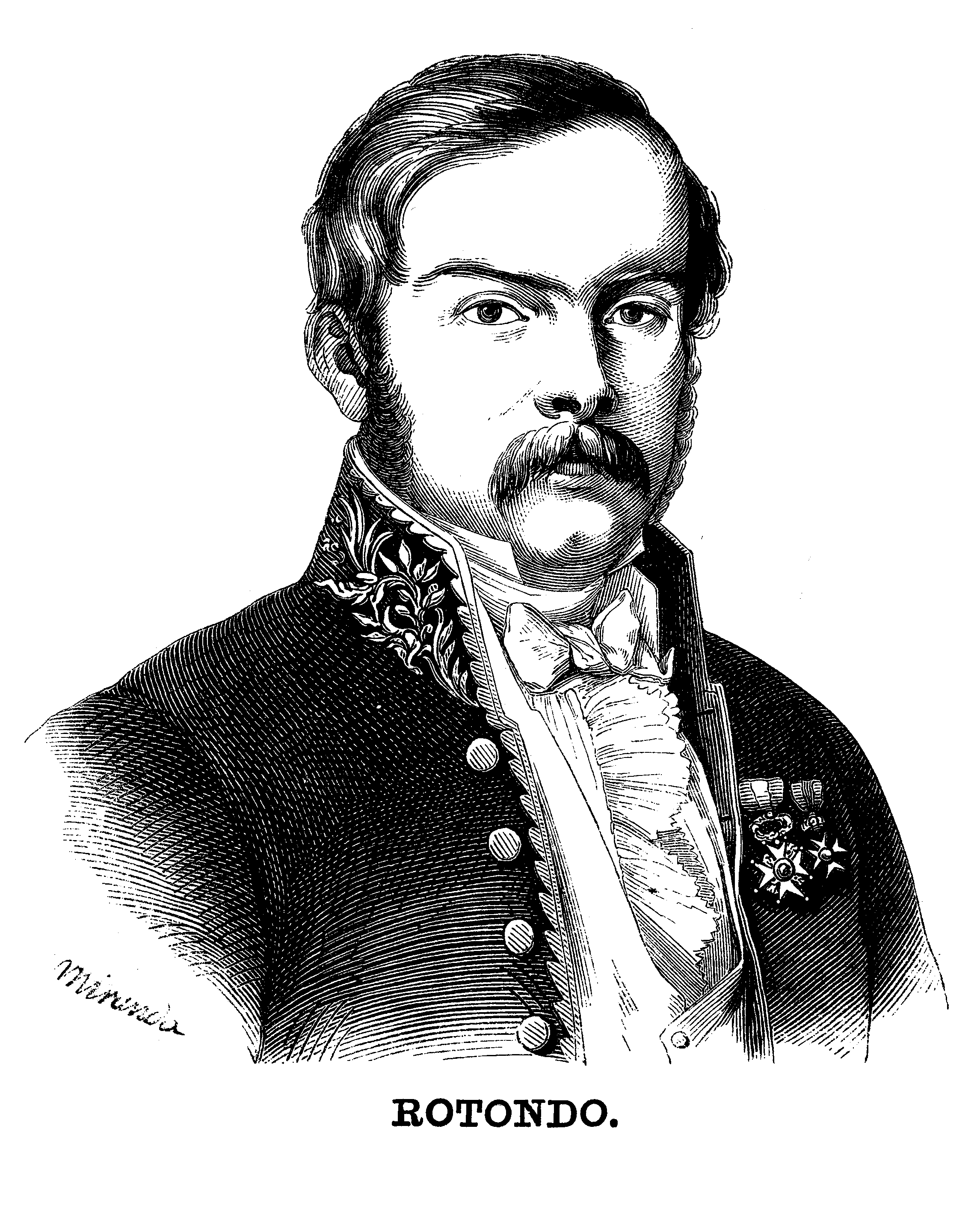 Retrato de Antonio Rotondo incluido en su Historia descriptiva, artística y pintoresca del Real Monasterio de S. Lorenzo comúnmente llamado Del Escorial, Madrid, Eusebio Aguado, 1863.